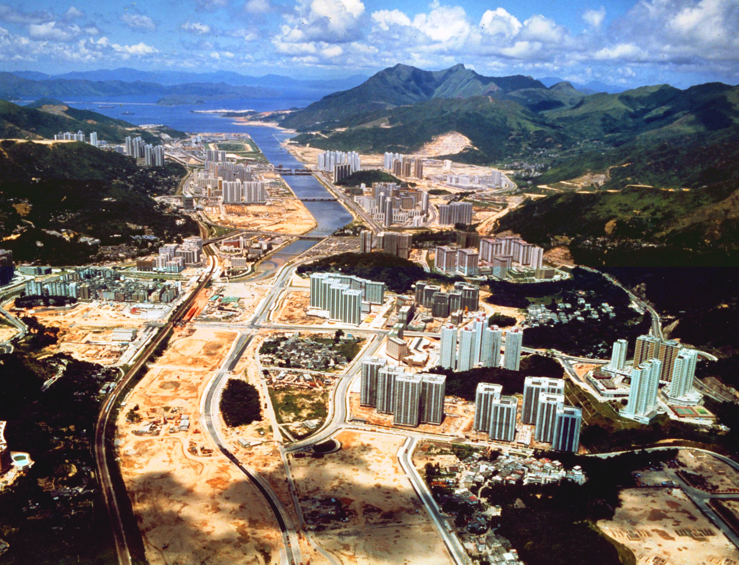 Mongdao 沙田望夫石遠望沙田城門河 Amah Rock (Mong Fu Shek)in Hong Kong Sha Tin